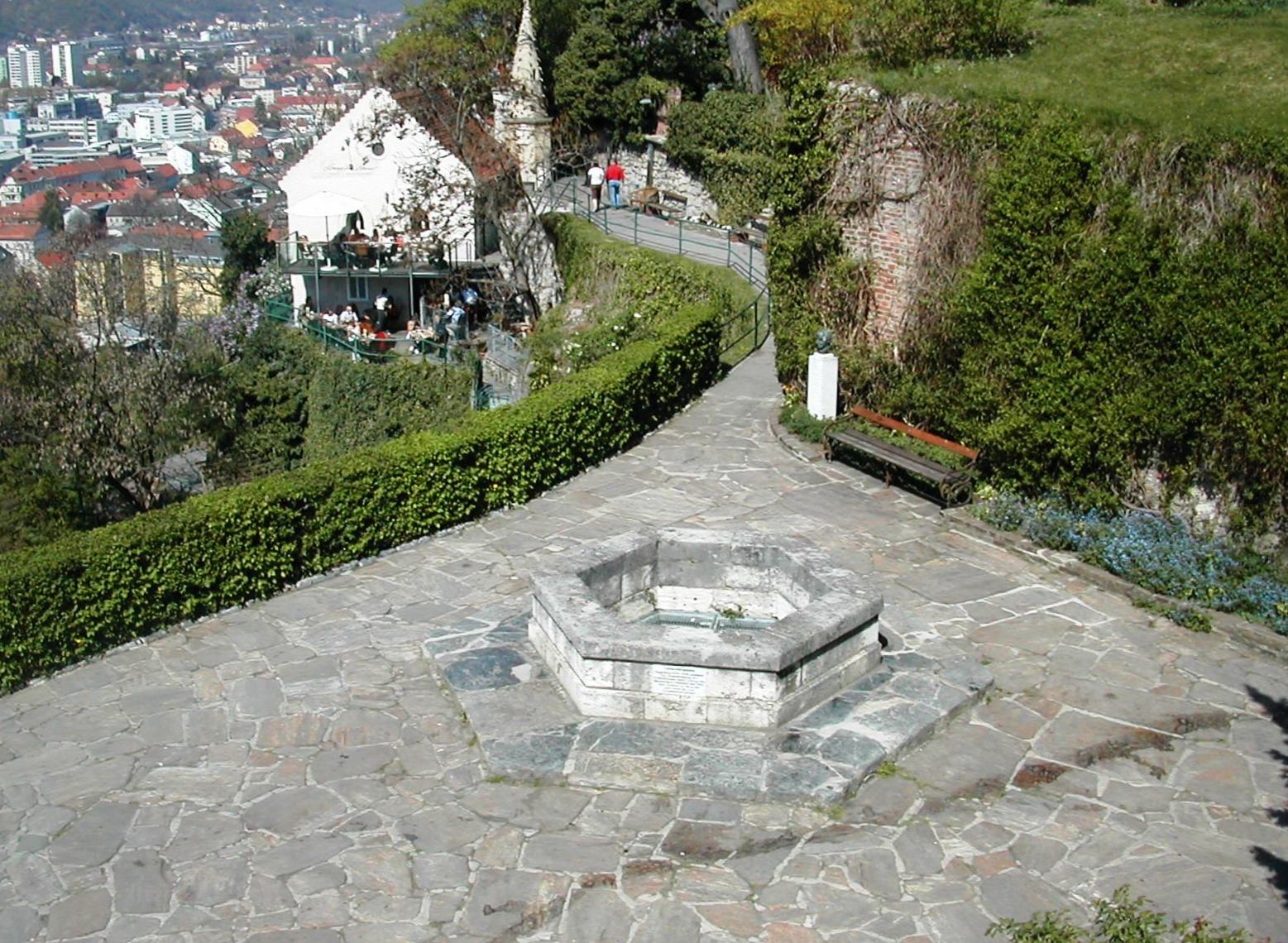 Türkenbrunnen und Starckehäuschen